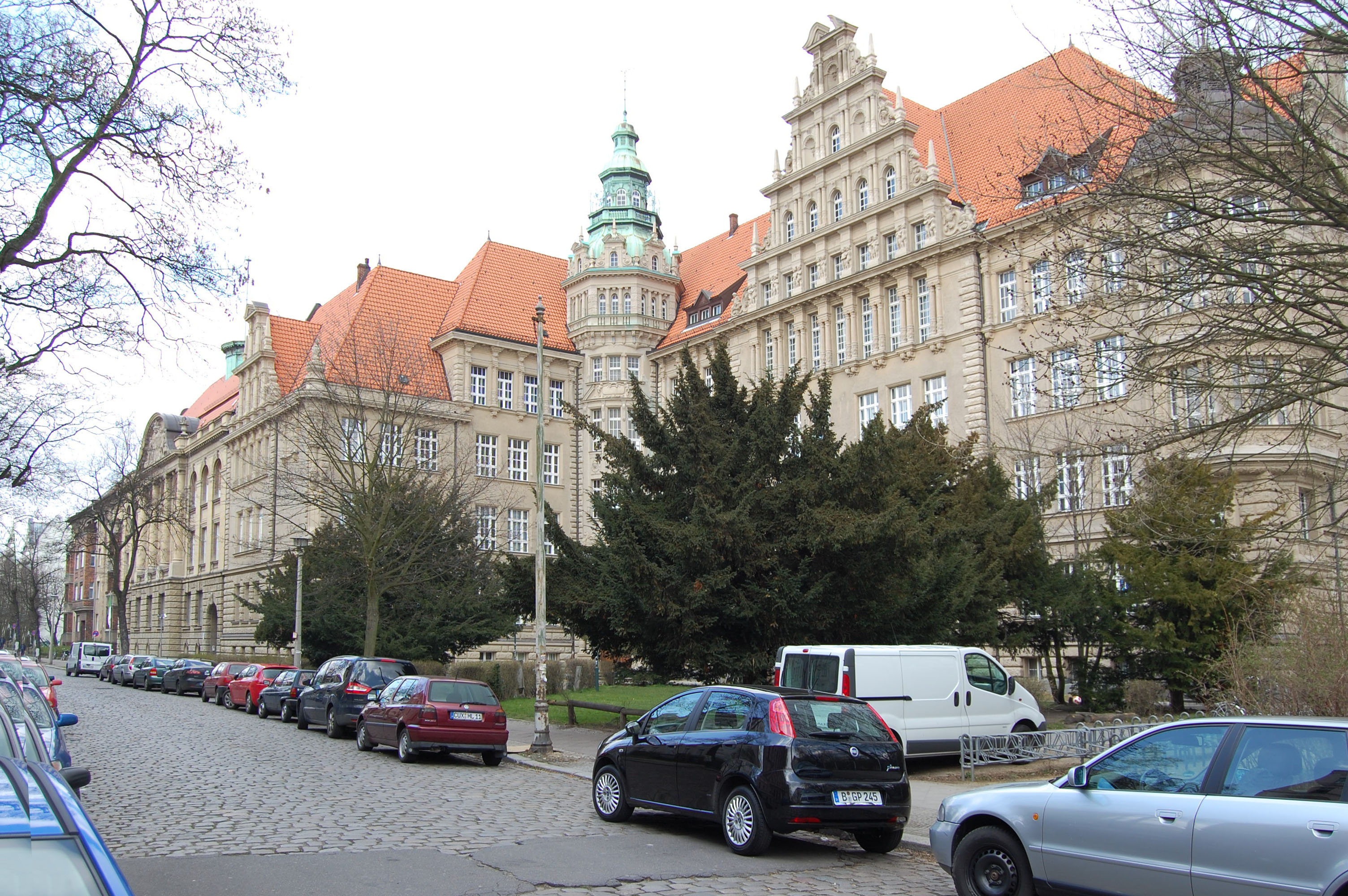 Carl-von-Ossietzky-Gymnasium, Berlin-Pankow, Görschstraße